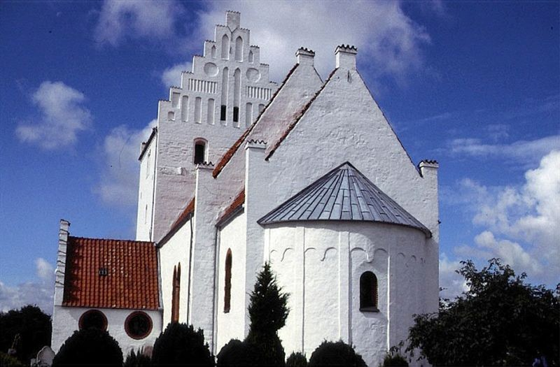 Horbelev Kirke i Danmark. Horbelev kirke